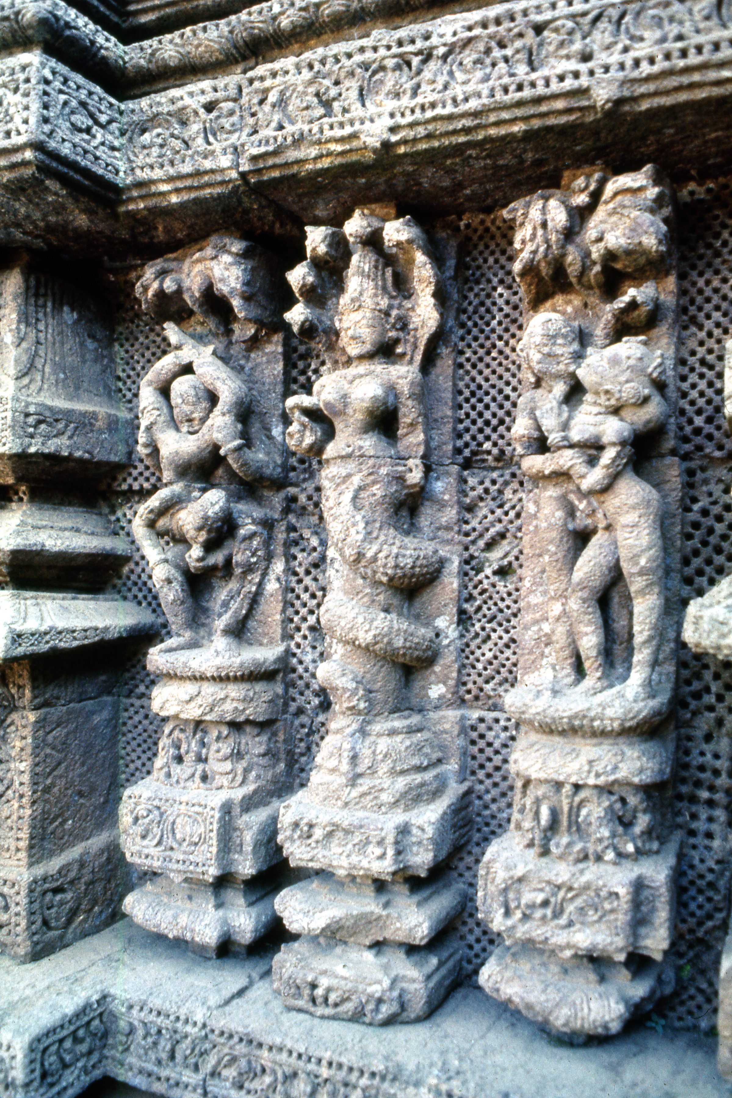 Orissa, Konarak,Siglo XIII,Templo de Surya/Templo del sol, en el centro se observa una escultura Nāginī con capucha de cobras rodeada por otras dos que representan un Maithuna